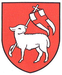 Wappen von Villars Bramard Kanton Waadt Schweiz